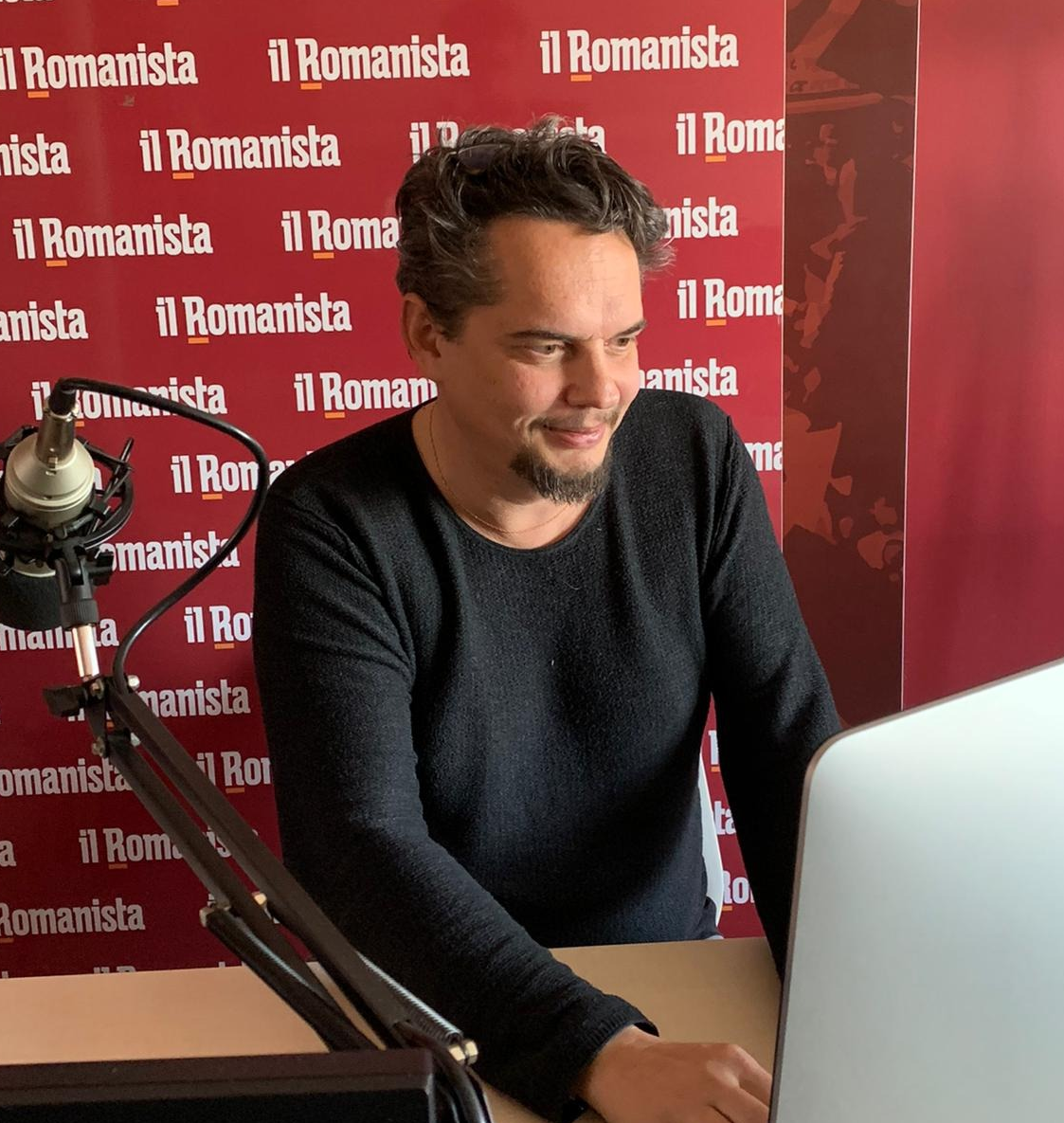 Tonino Cagnucci giornalista italiano